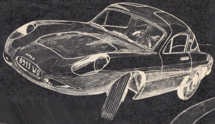 Voiture Atla créé par Jacques Durand